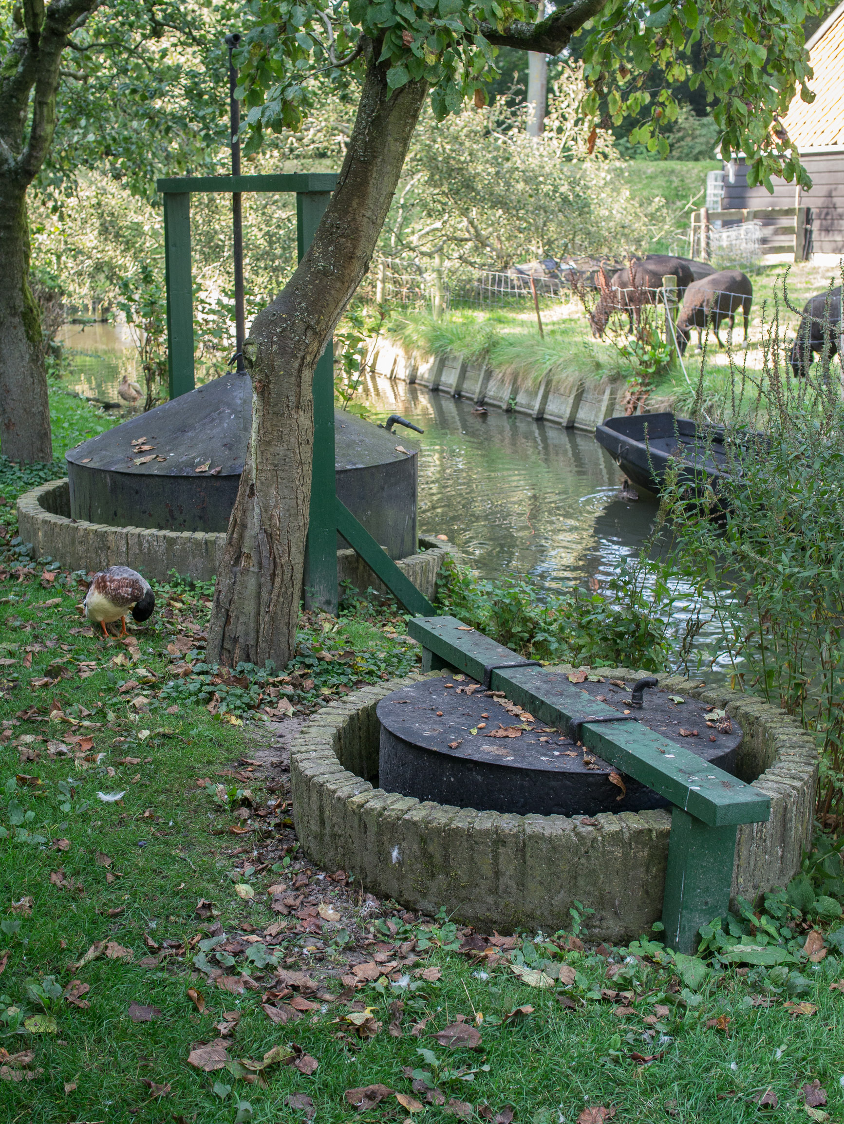 Zuiderzeemuseum Enkhuizen - Brongas putten